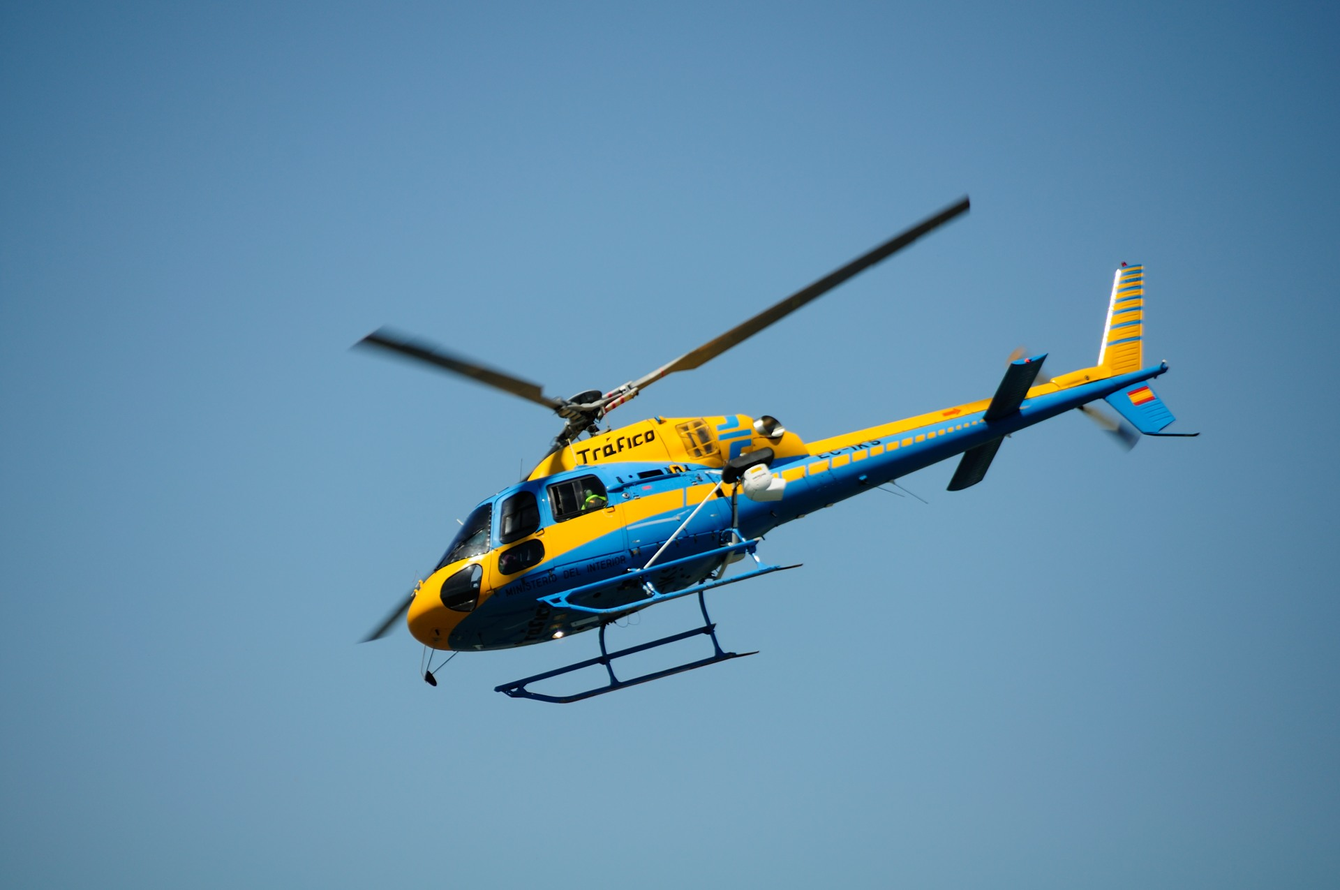 DGT